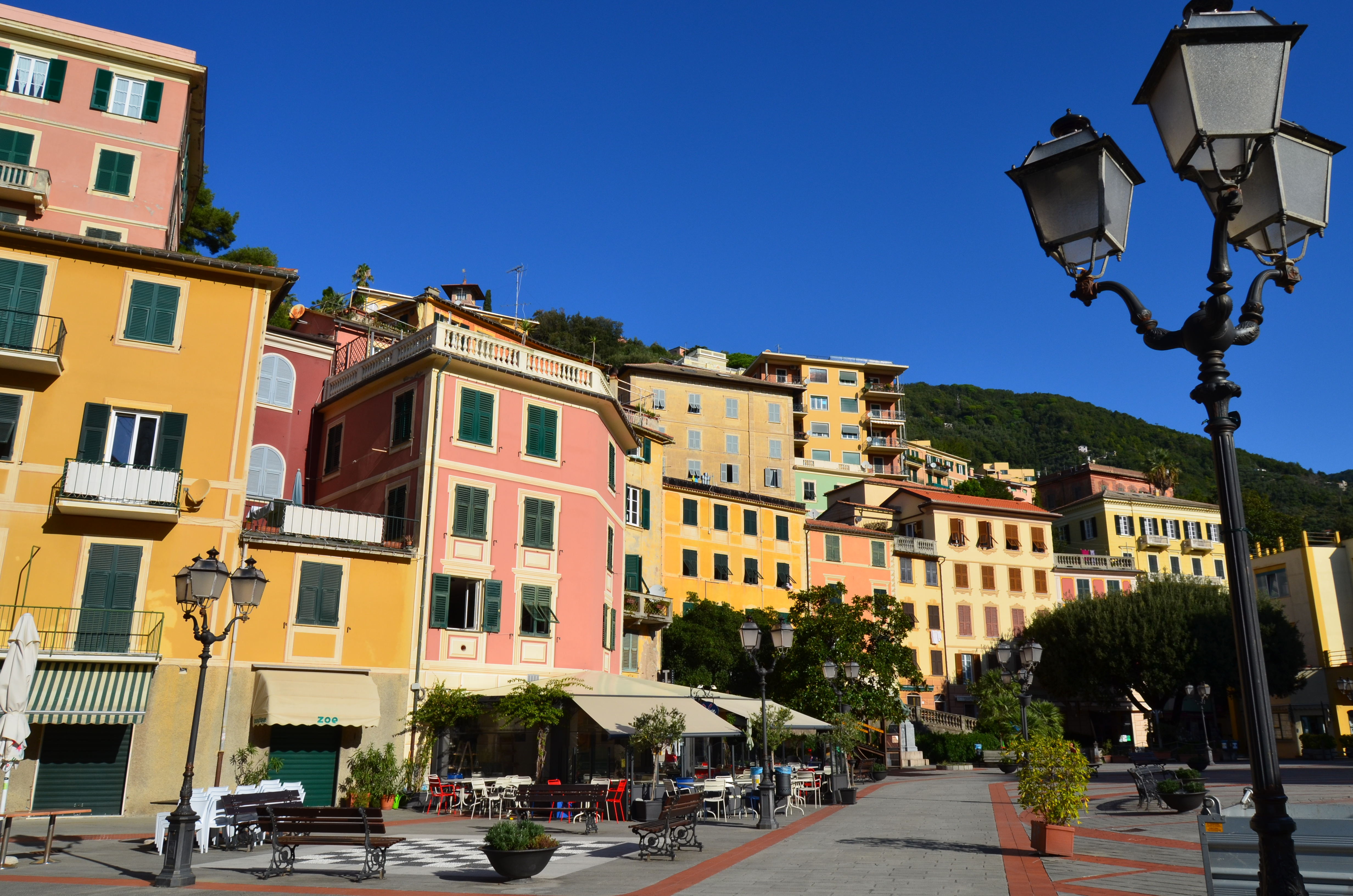 Piazza XXVII Dicembre, Zoagli, Liguria, Italia